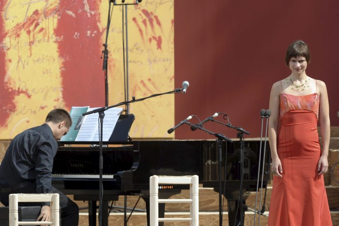 Marisa Martins i Josep Surinyac a l'acte institucional de la Diada Nacional de Catalunya 2012 al parc de la Ciutadella